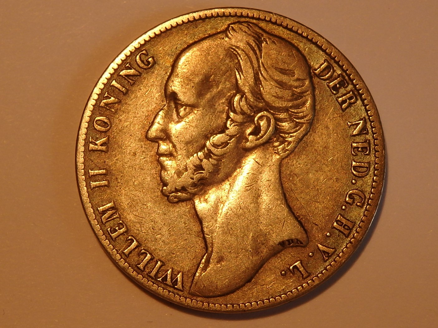 Wilhelm II. auf Gulden von 1848